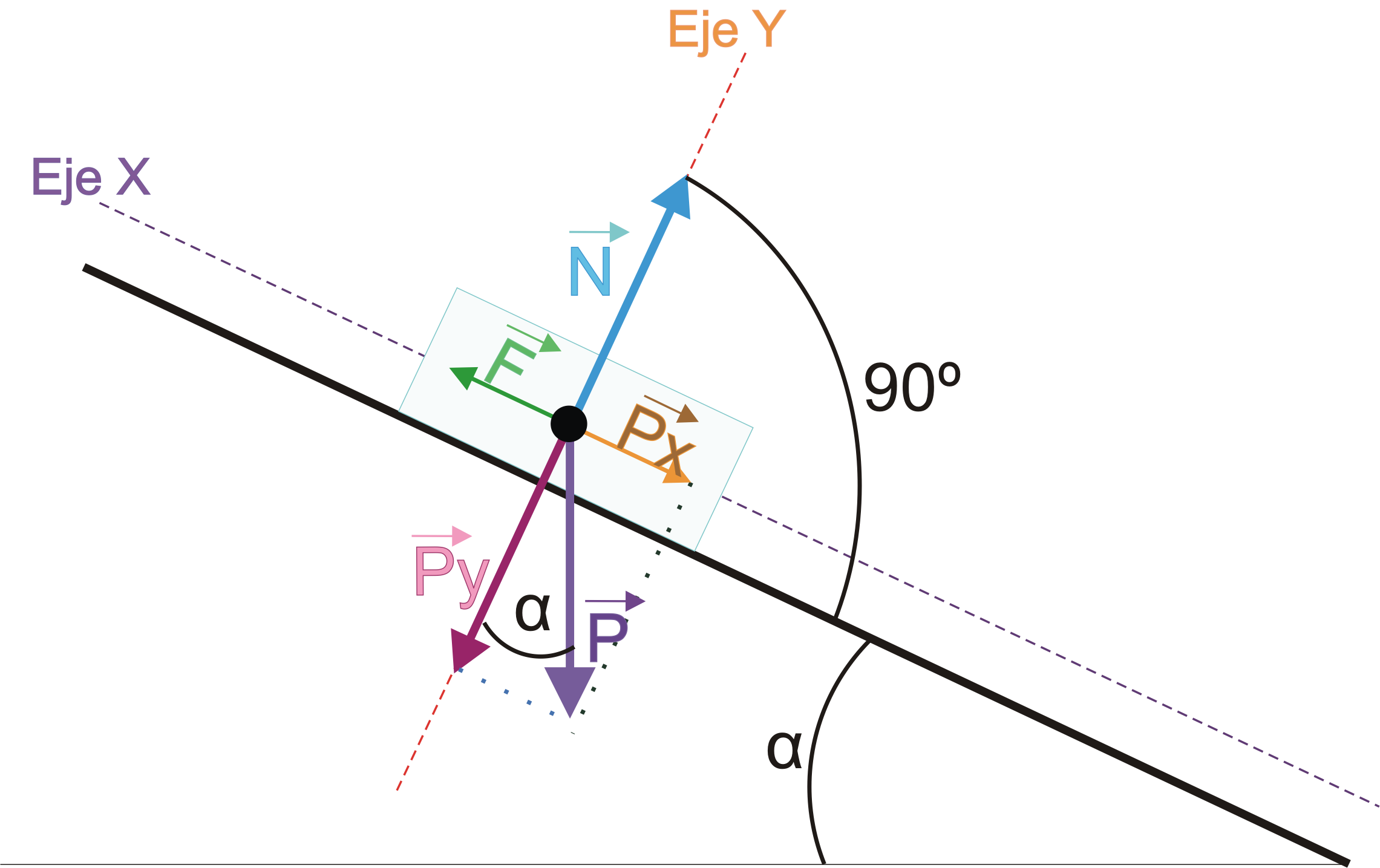 la misma que Descomposicion_de_fuerzas_en_plano_inclinado.jpg